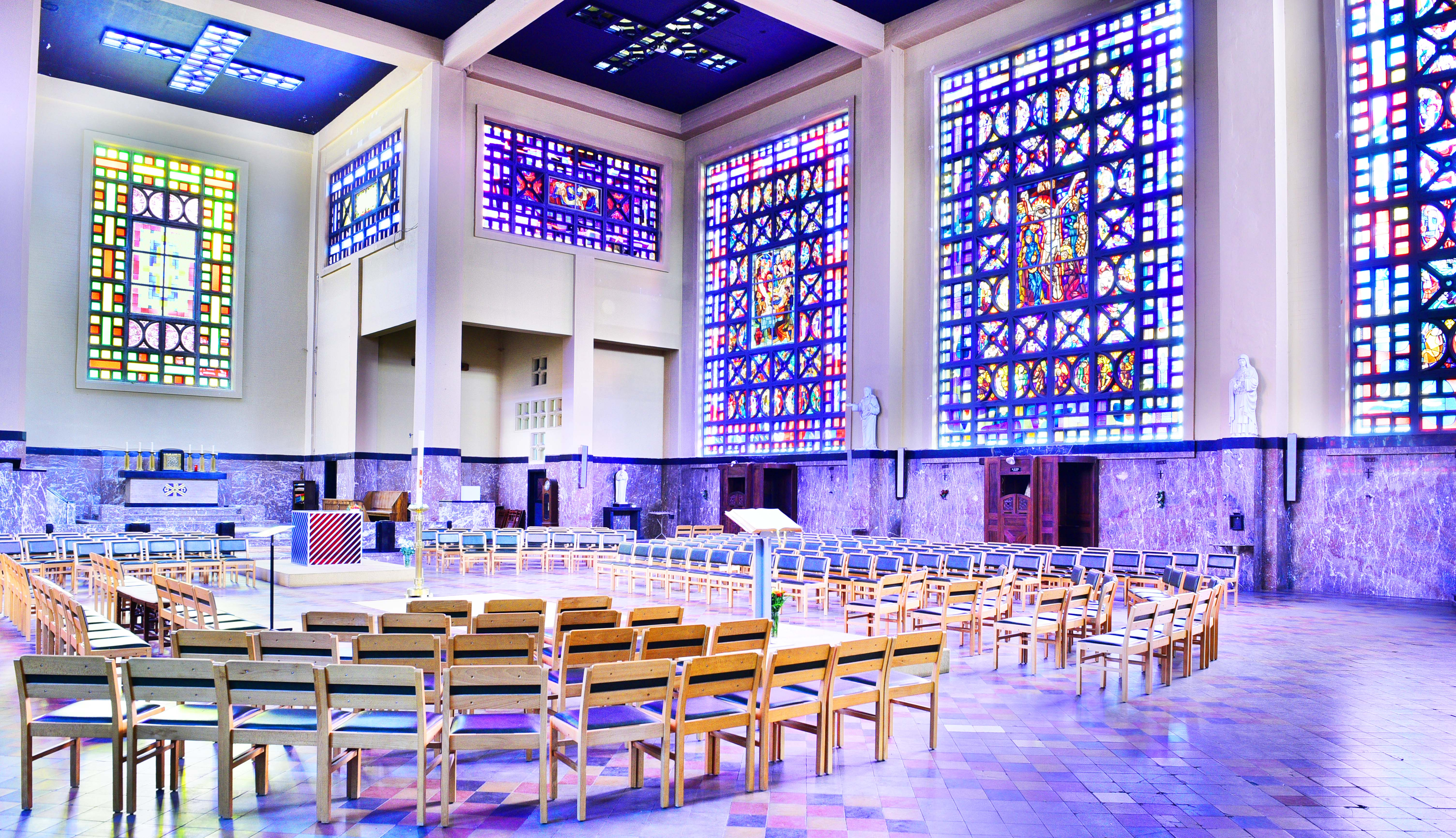 Église Sainte-Suzanne